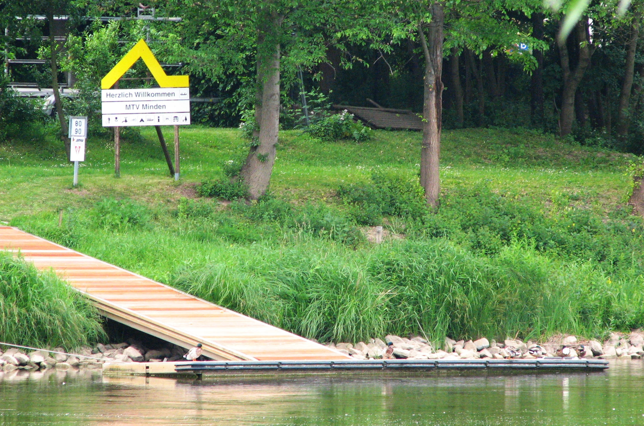 Signatur der Gelben Welle am Kanuclub MTV in Minden an der Weser